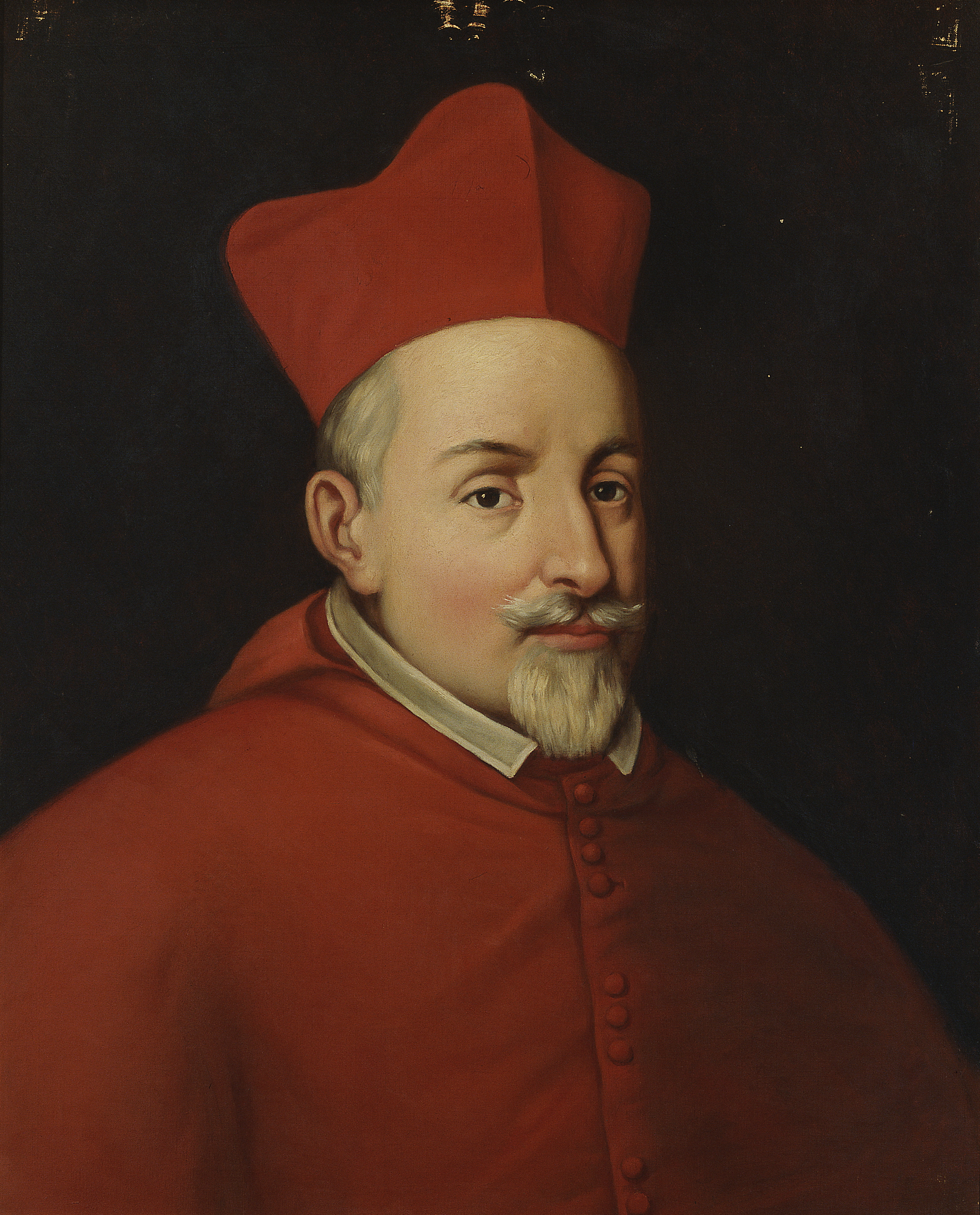 Retrato del eclesiástico español Alfonso de la Cueva (1574-1655), que llegó a ser cardenal de la Iglesia Católica y obispo de Malaga. Esta obra es una copia del retrato original que se conservaba en la antigua colección del marqués de Bedmar.